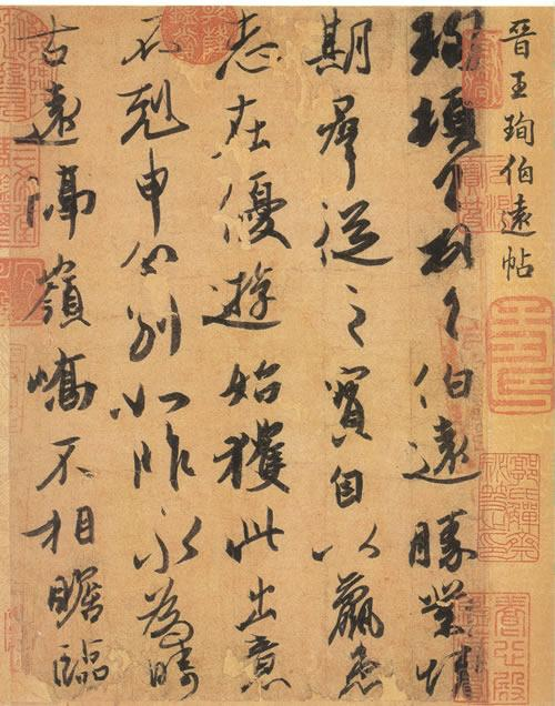 伯遠帖